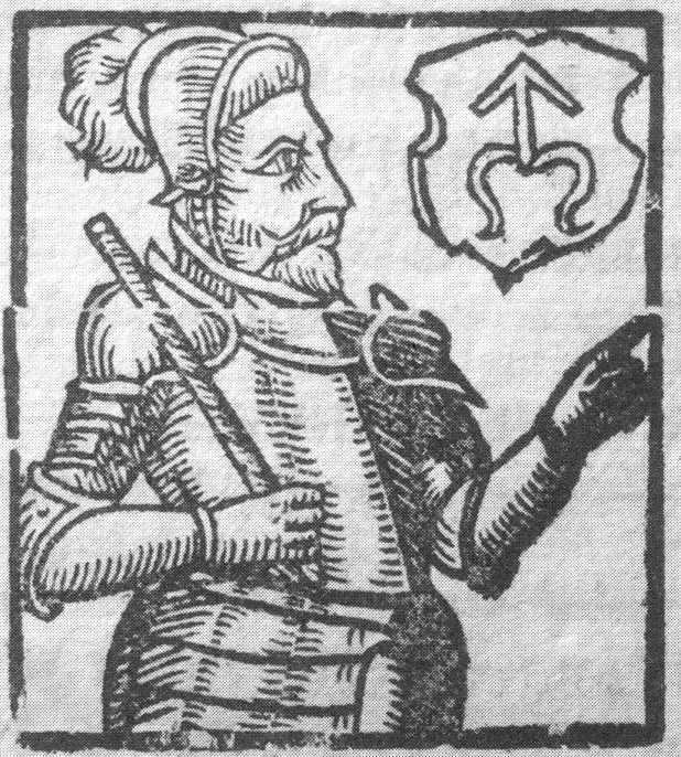 Jan Jičínský z Kravař a Fulneka